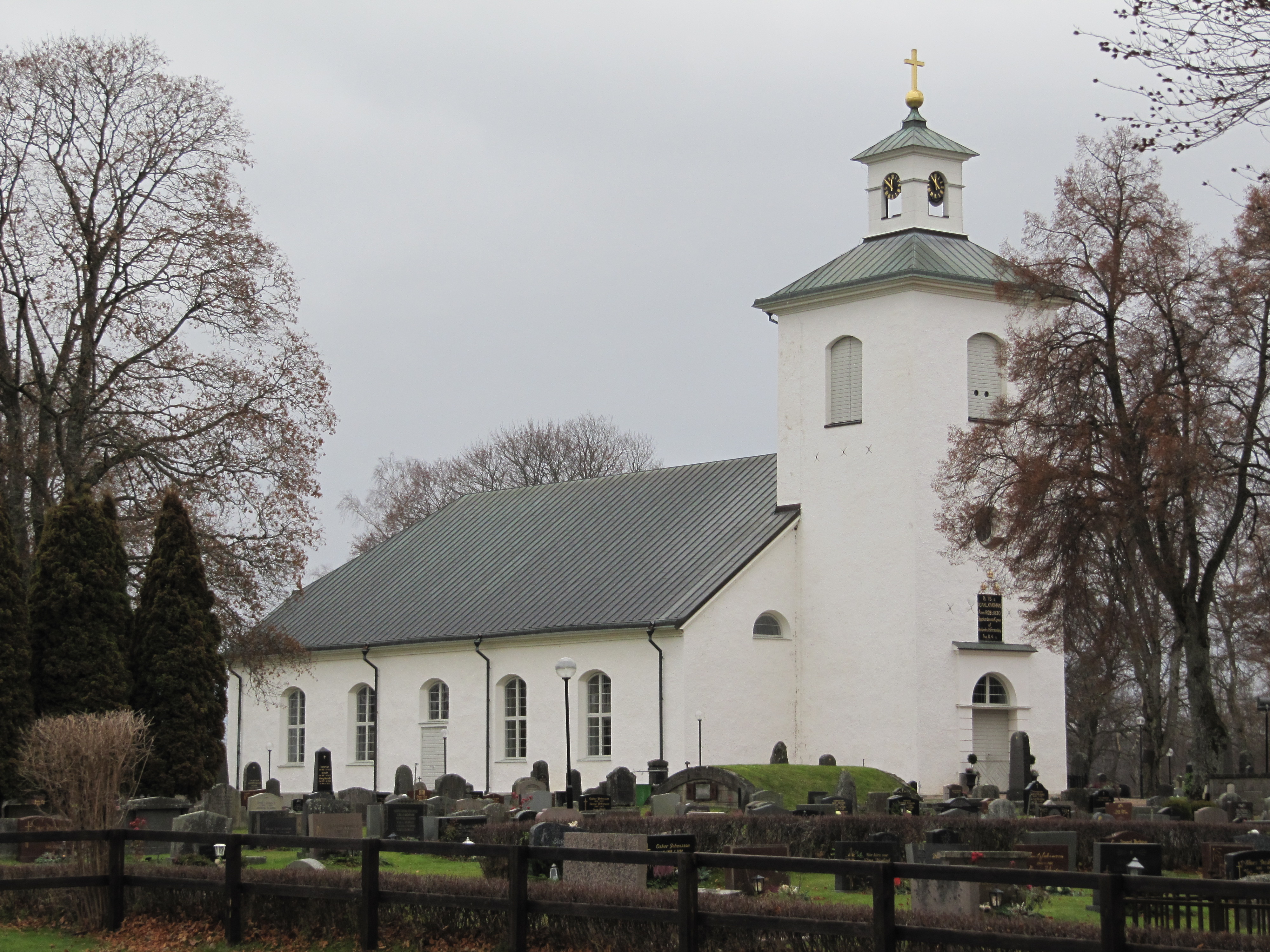 Stenbrohults kyrka